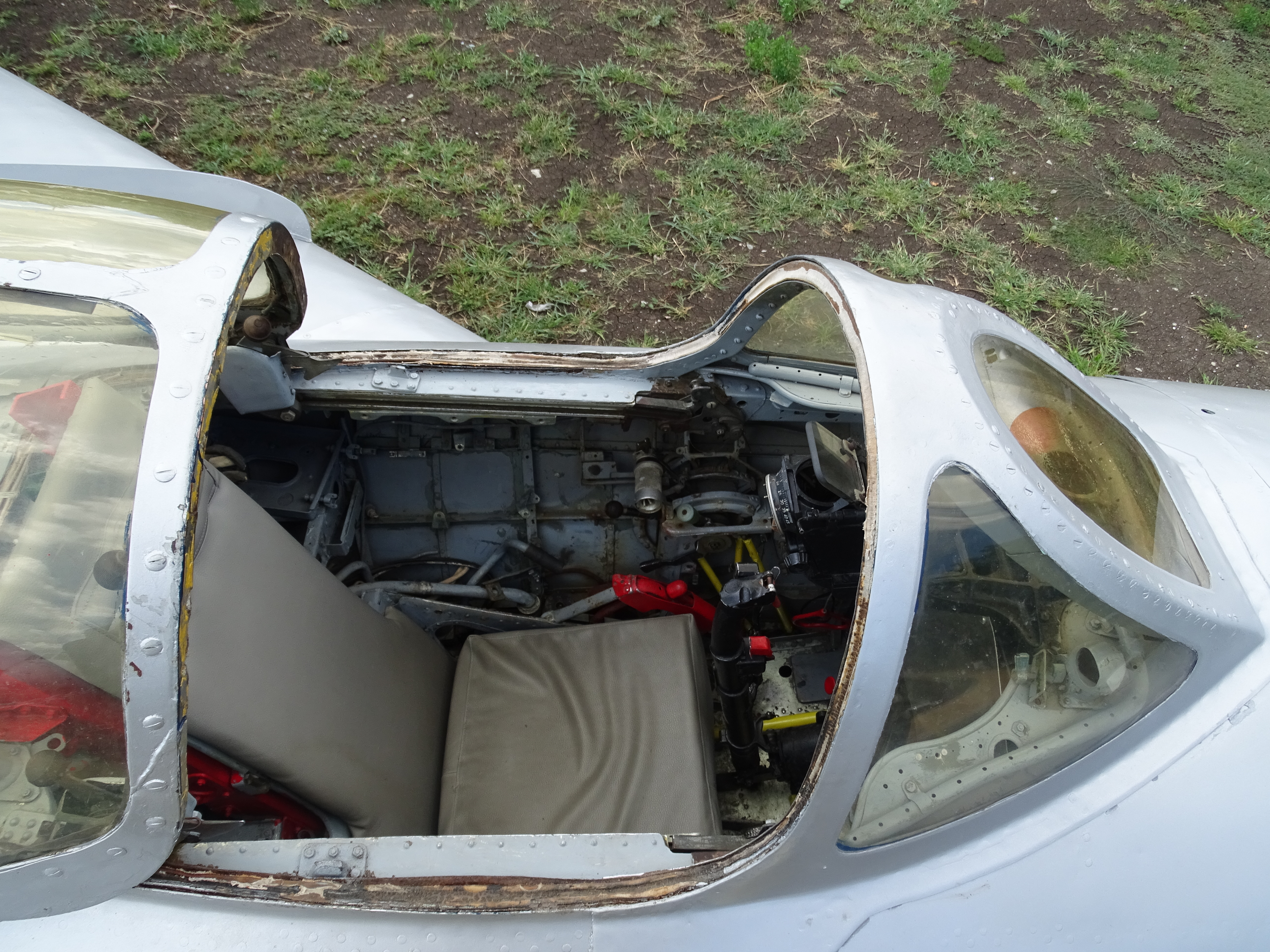 Cockpit van een Mikojan-Goerevitsj MiG-17F in het Luchtvaartmuseum te Burgas (Bulgarije).